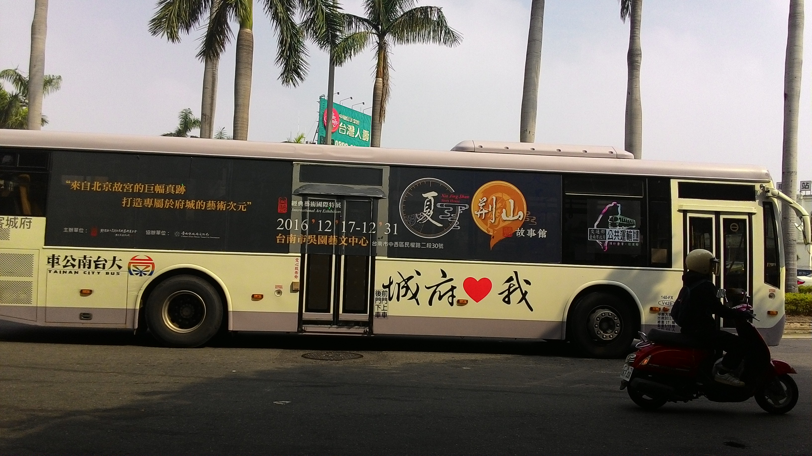 Volvo低底盤公車行駛21路